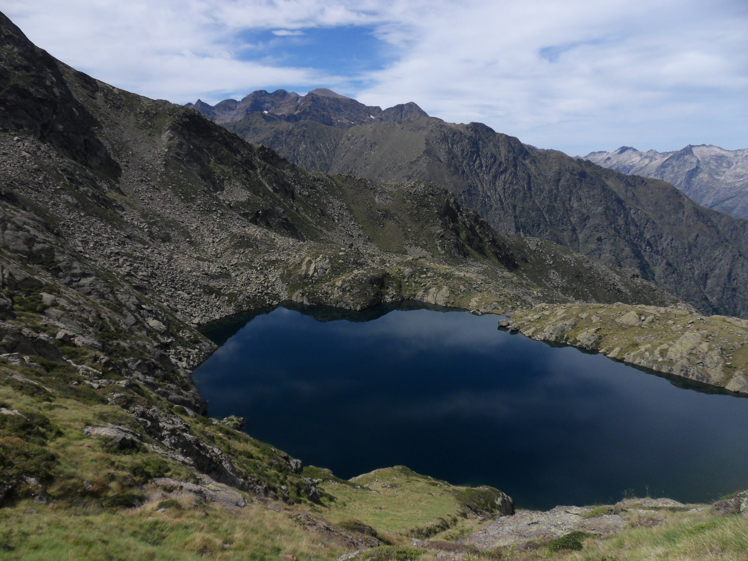 Troisième étang du Picot 2286m